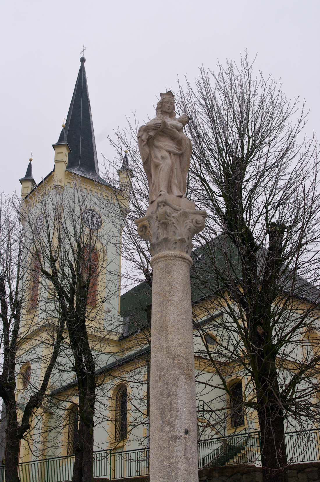 Sloup se sochou Panny Marie a kašna, nám. Karla IV., Krajková